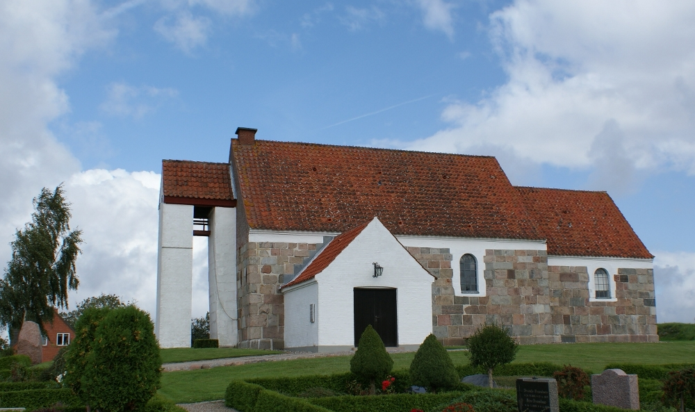 Storarden kirke, i Storarden Sogn, Nordjylland_september 2009